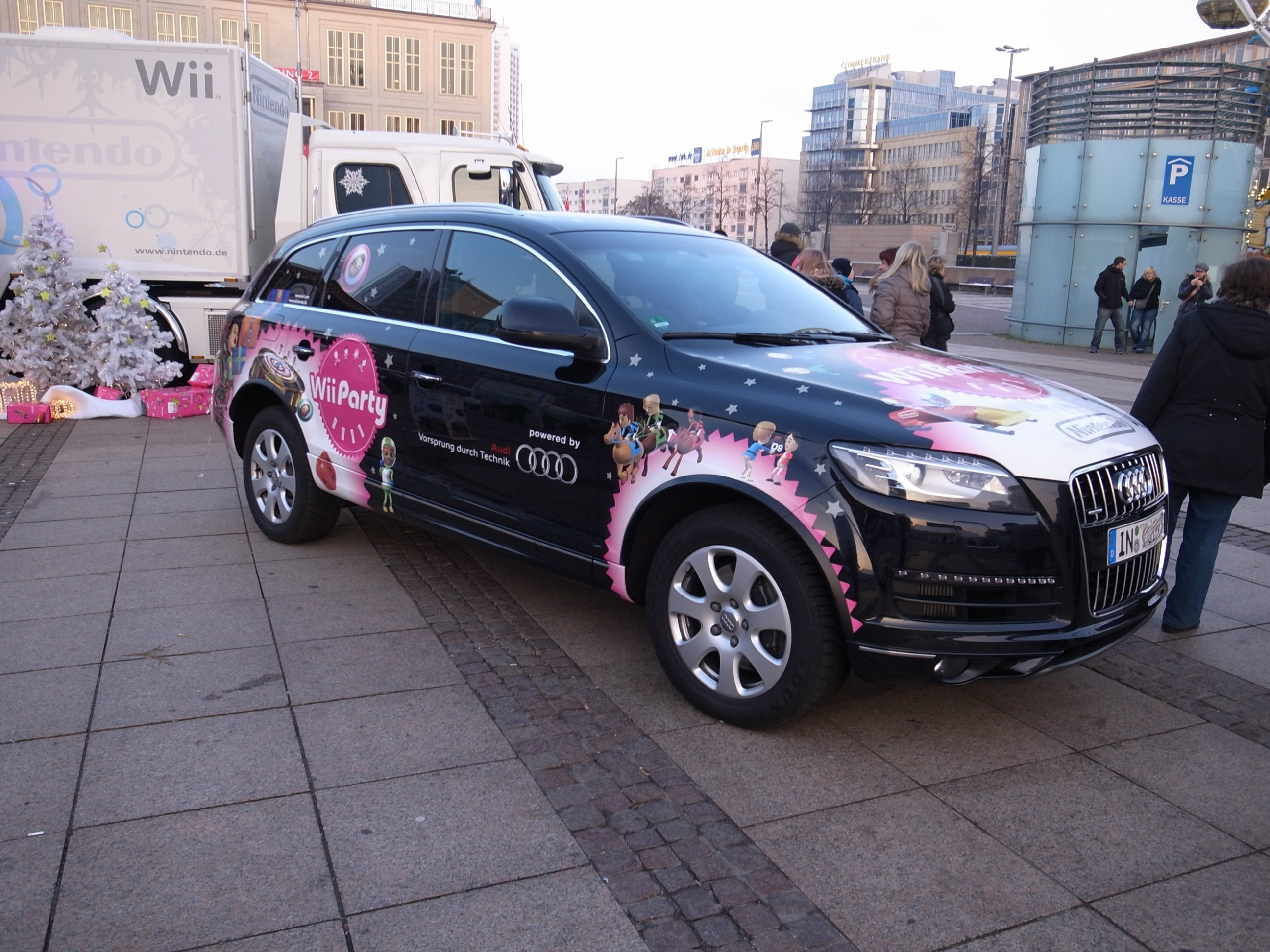 Nintendo Winter Truck Tour - AUDI Q7 Tour 2010